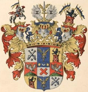 Brevern de la Gardie suguvõsa krahvivapp